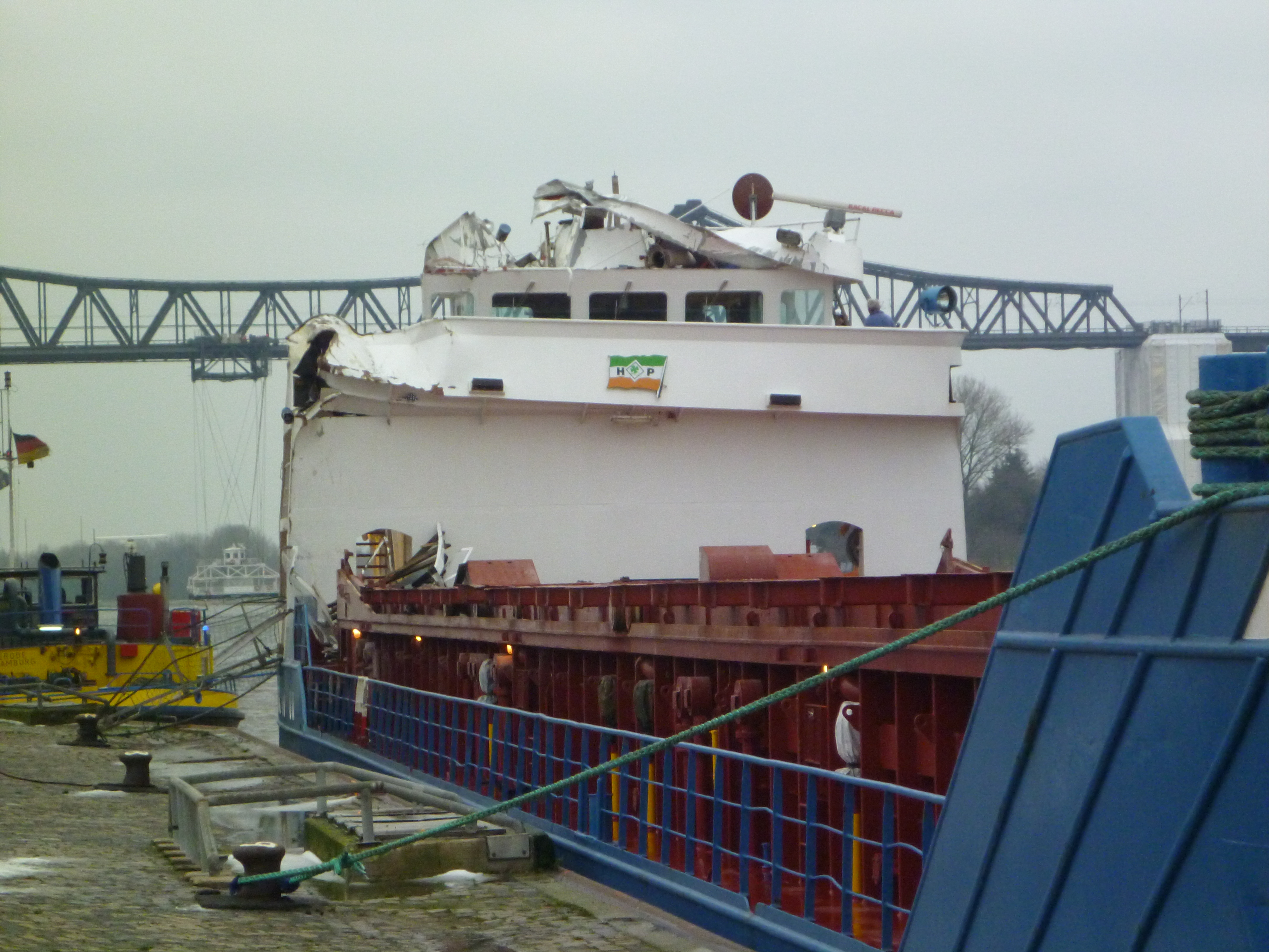 Am 08.01.2016 etwa um 7:00 Uhr ist die Evert Prahm mit der Schwebefähre in Rendsburg auf dem Nord-Ostsee-Kanal kollidiert. Bei der Evert Prahm wurde die Brücke sowie der Mast, die Antennen und Radaranlagen beschädigt. Auf der Schwebefähre gab es zwei Verletzte, es entstand schwerer Sachschaden.